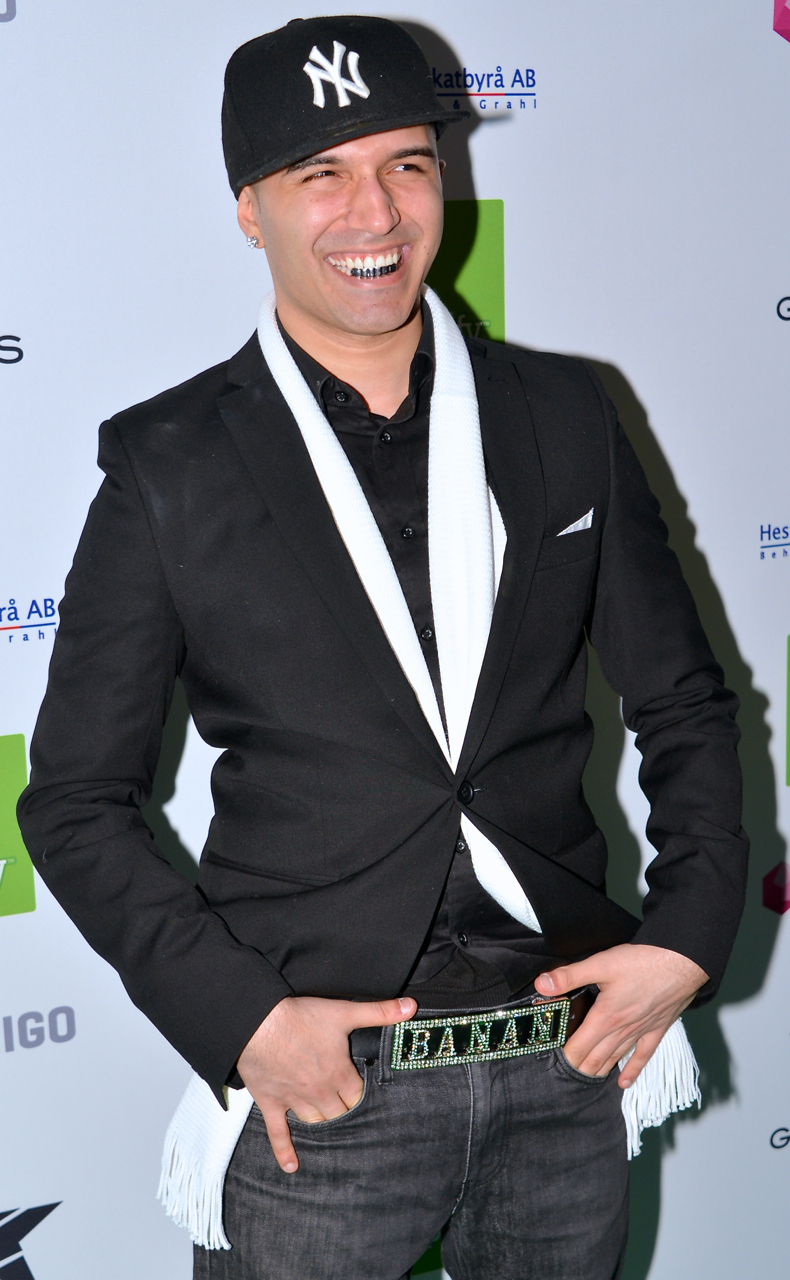 Sean Banan på Grammisgalan på Cirkus, Stockholm den 20 februari 2013.